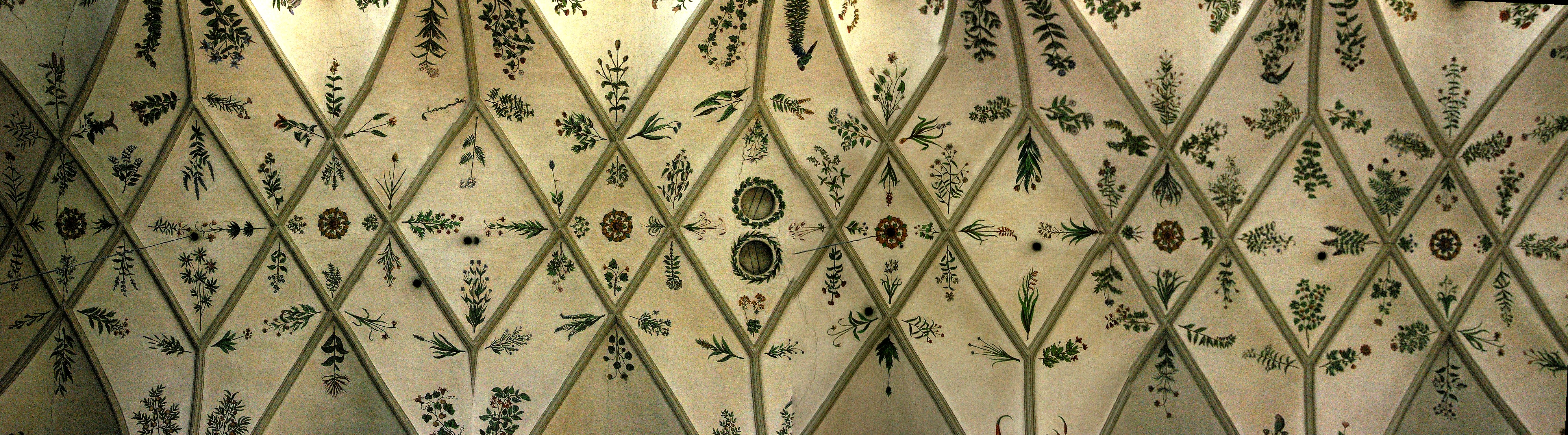 Bamberg - Kloster Michaelsberg - Gewölbedecke